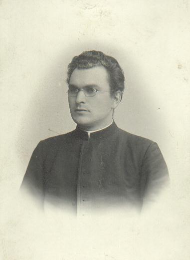 Mikalojus Šeižys-Dagilėlis (1874–1950) - Lietuvos kunigas ir rašytojas. 1933-1950 klebonavo Pakruojyje (palaidotas bažnyčios šventoriuje).